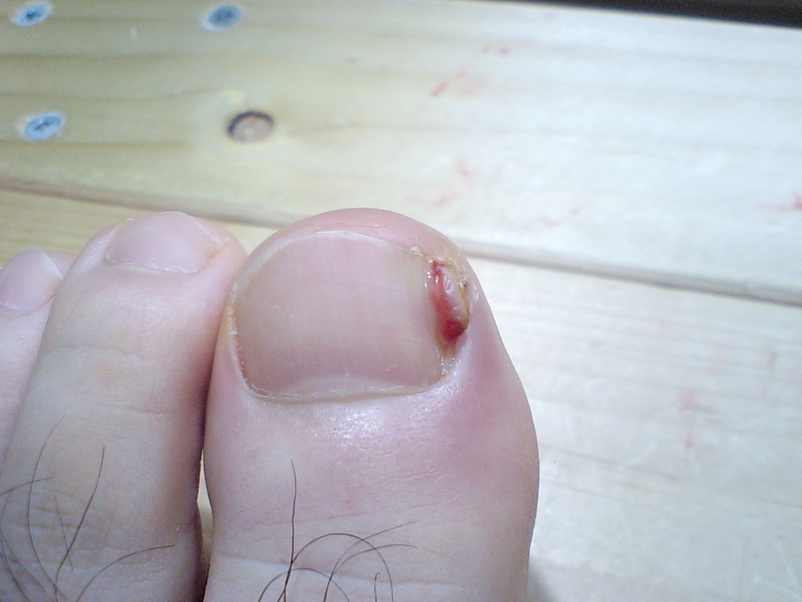 陥入爪から生じた化膿性肉芽腫を正面から撮影。